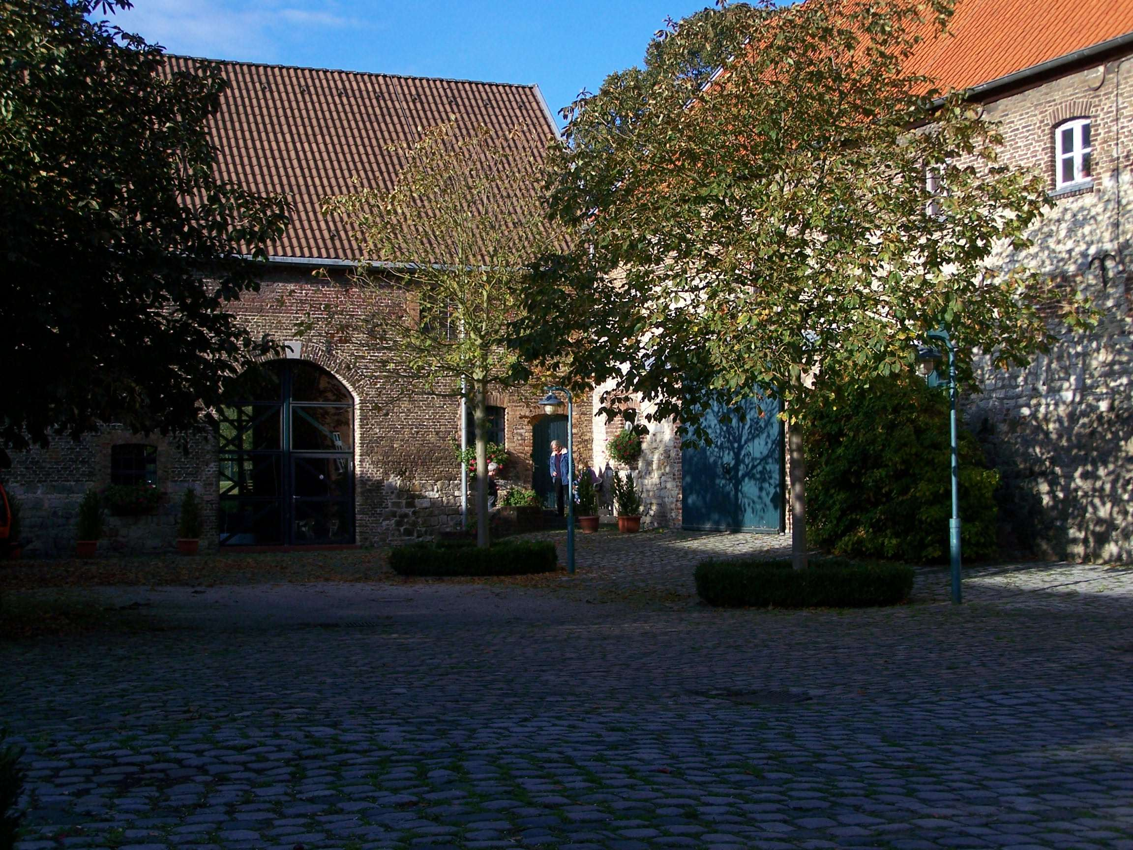 Innenansicht des Gut Melatens